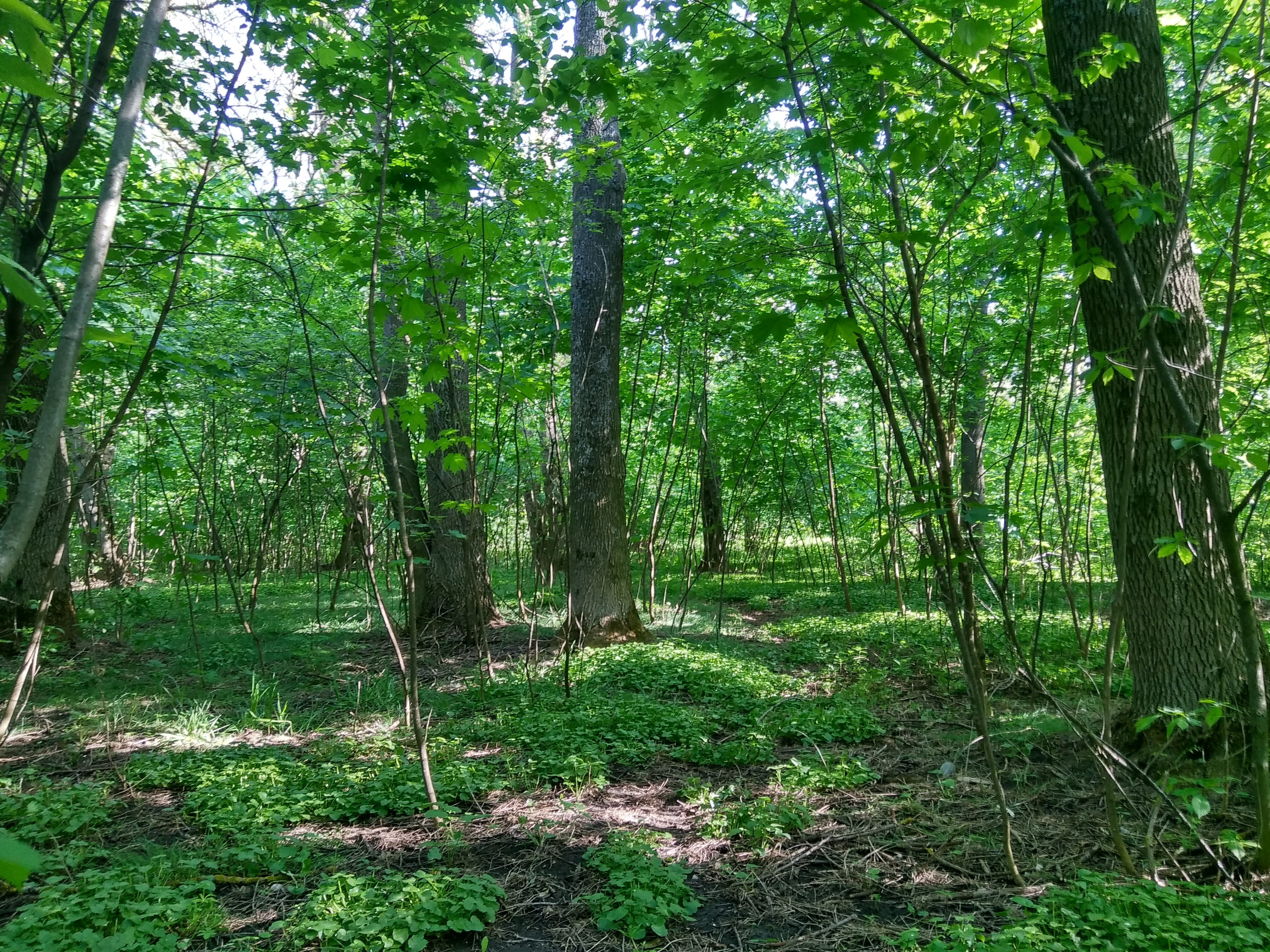 Parcul din satul Rediul Mare, monument al naturii amplasat în raionul Dondușeni, satul Rediul Mare (cod MD-DN-map-009)